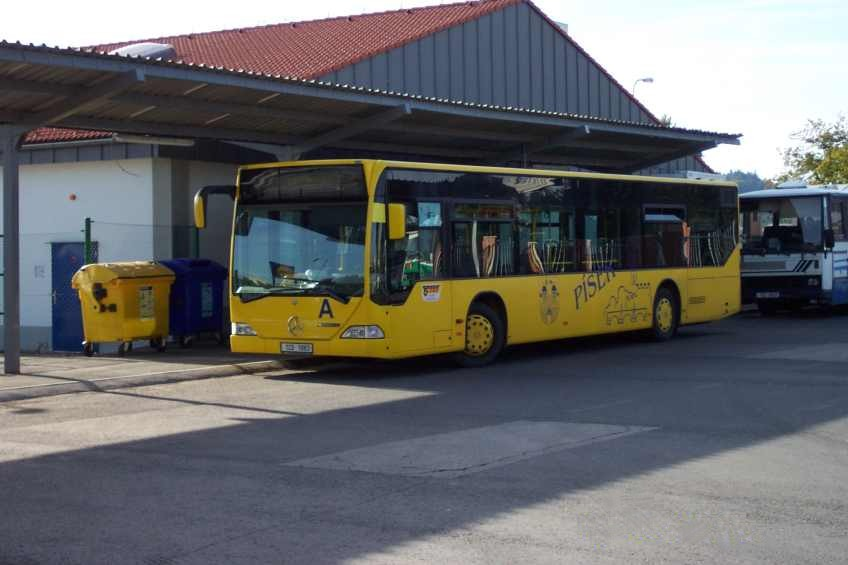 Autobus Mercedes Citaro ve standardním provedení v Písku